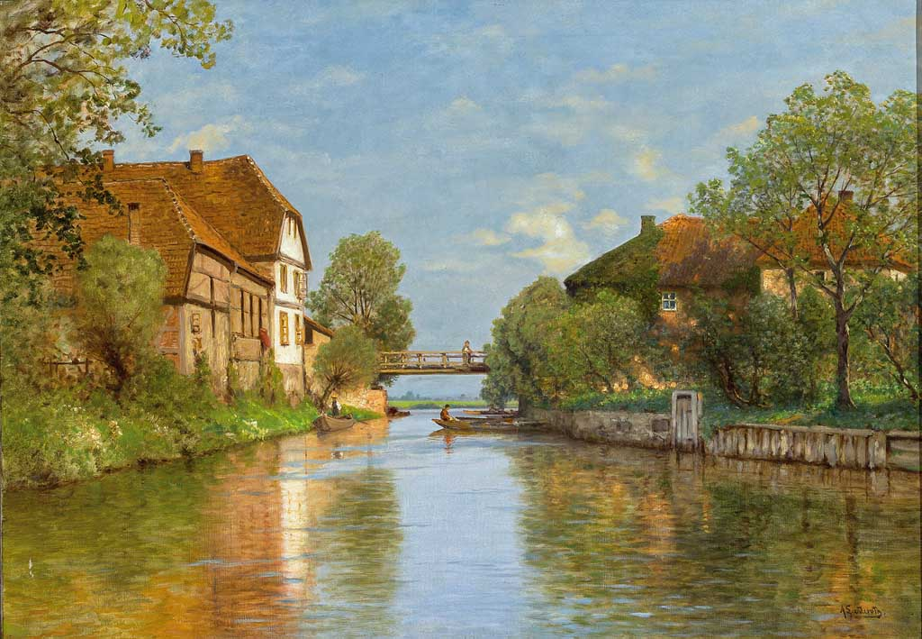 Kanalansicht mit alten Häusern und hölzerner Brücke. Öl auf Leinwand. 65 x 93 cm. Signiert.